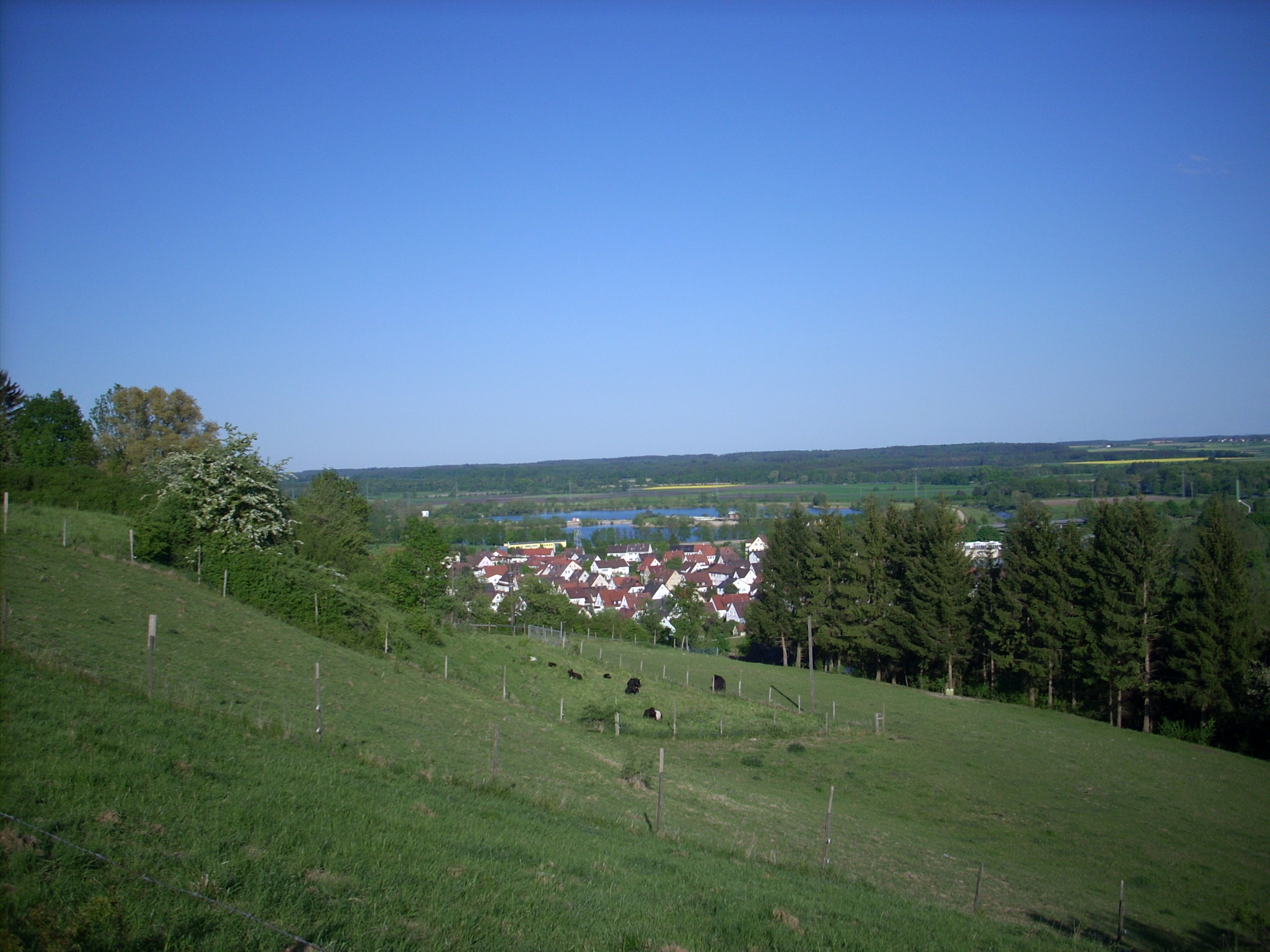 Blick vom Jakobsweg auf den Stadtteil Häckle und die Erbacher Seenplatte